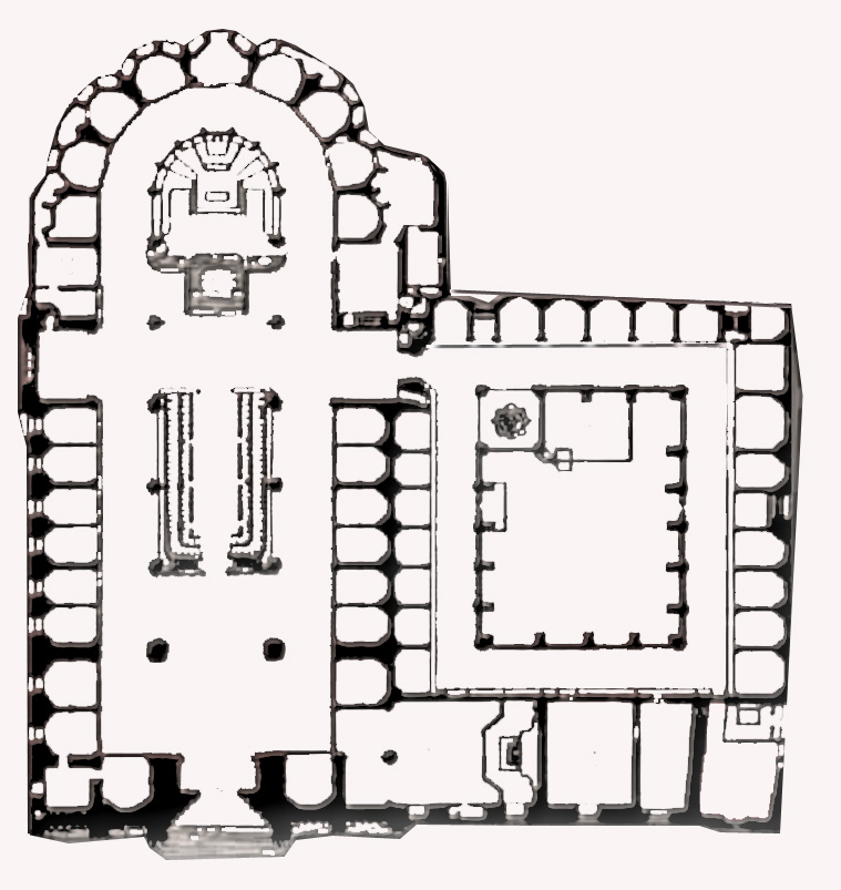 Plànol de la Catedral de Barcelona